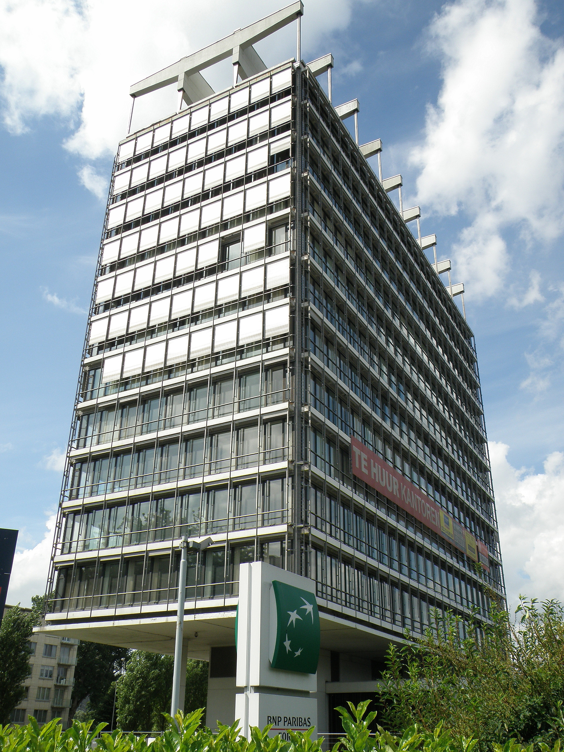 Antwerpen, België. BP-building, gelegen aan de Jan Van Rijswijcklaan nr.162. In 1959-1960 opgetrokken n.o.v. Léon Stynen en Paul De Meyer.